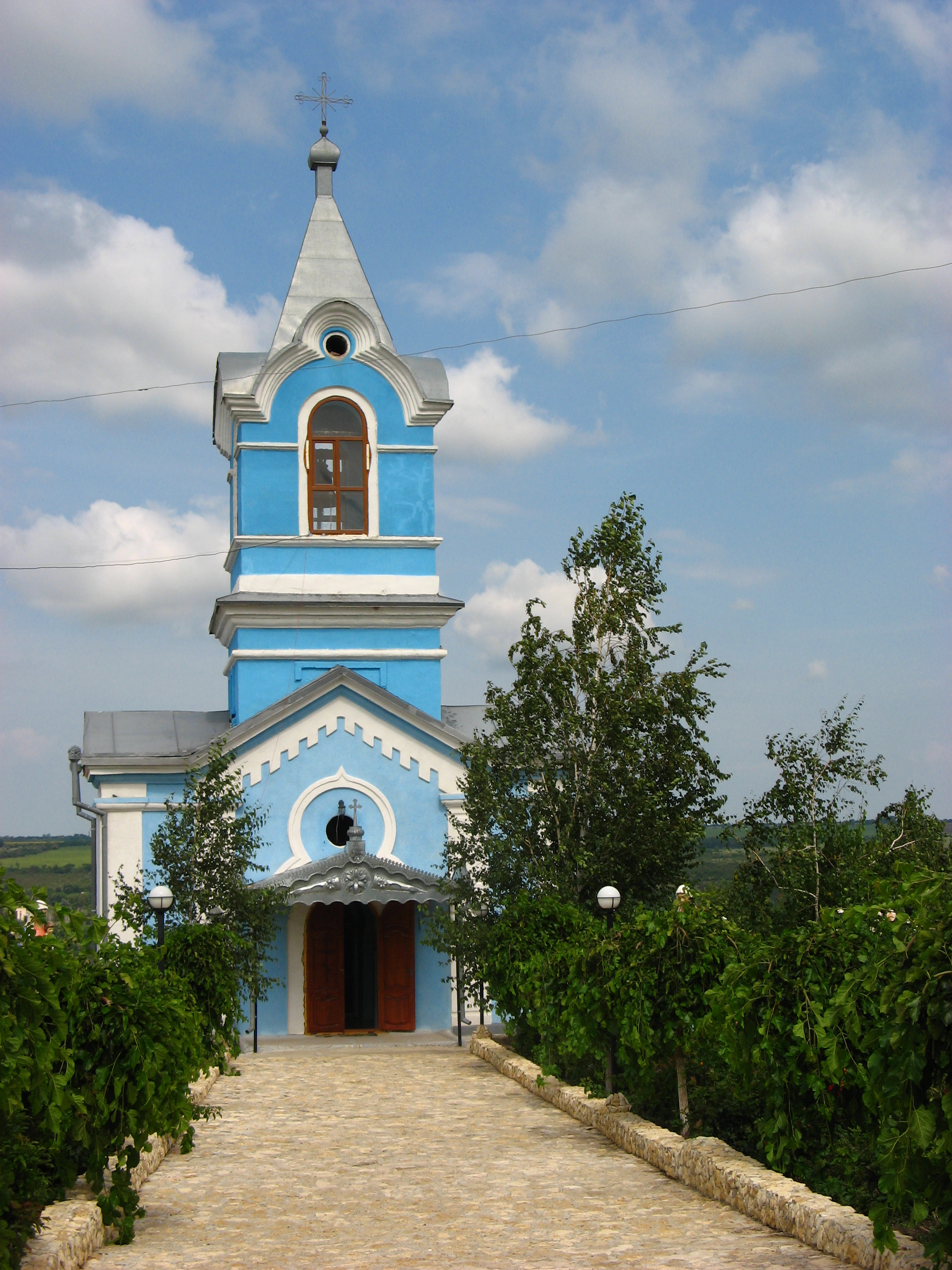 Biserica mănăstirii Ţipova.